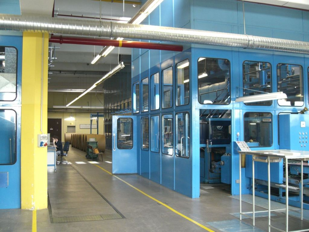 德国耶和华见证人伯特利 Niderselters